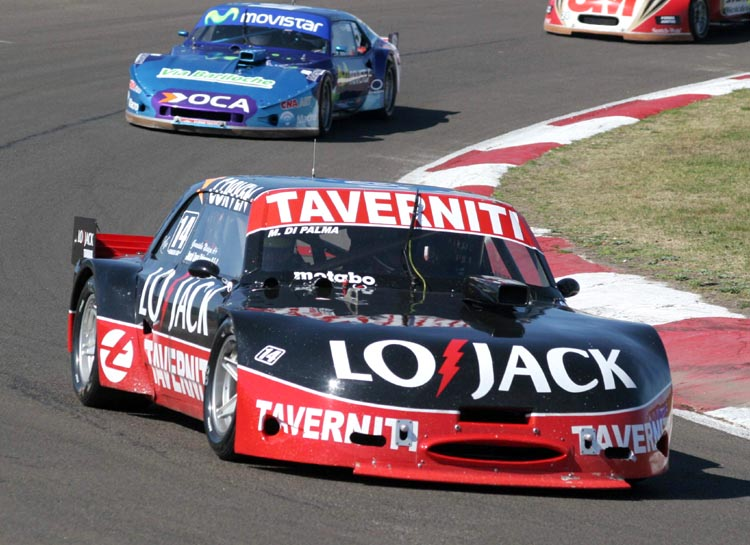 La siguiente es una fotografía del automóvil Torino Cherokee del piloto Marcos Di Palma. La misma fué tomada por Cholo Cano, fotografo de Argentina y publicada en su sitio web: La misma fué solicitada para su publicación en Wikipedia como lo exigen las leyes de Copyright.